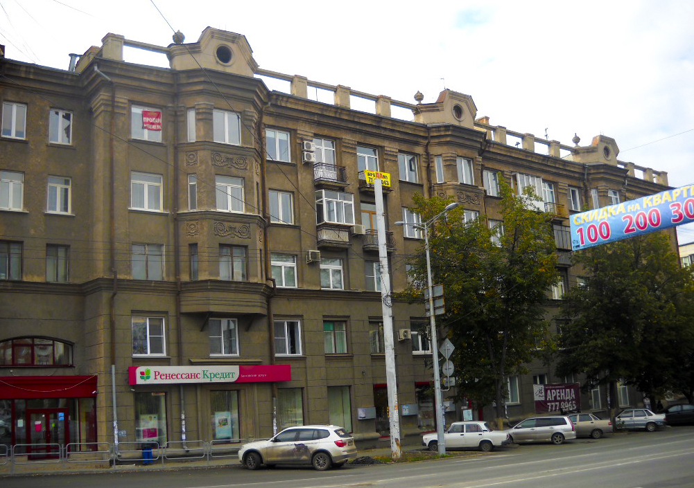 Дом, в котором жил Белостоцкий И.С.: улица Свободы, 66, кв. 53, Челябинск, Челябинская область